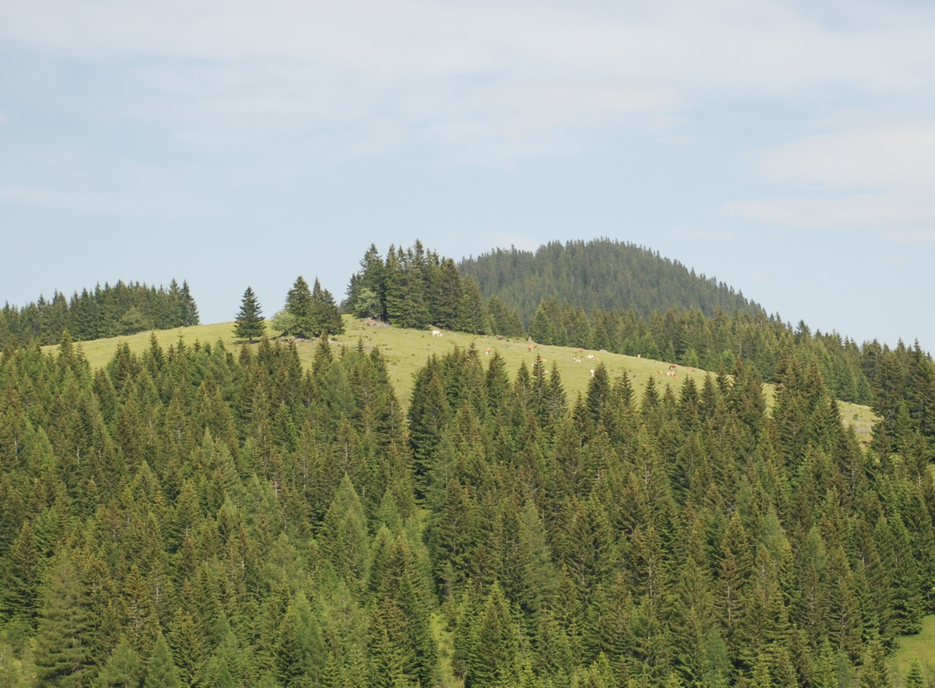 Hochriegel mit Schwarzkogel im Hintergrund. Im Vordergrund die Schneise des um 1970 einige Jahre bestehenden Schilifts (später abgebaut und auf den gegenüber liegenden Nordhang verlegt)